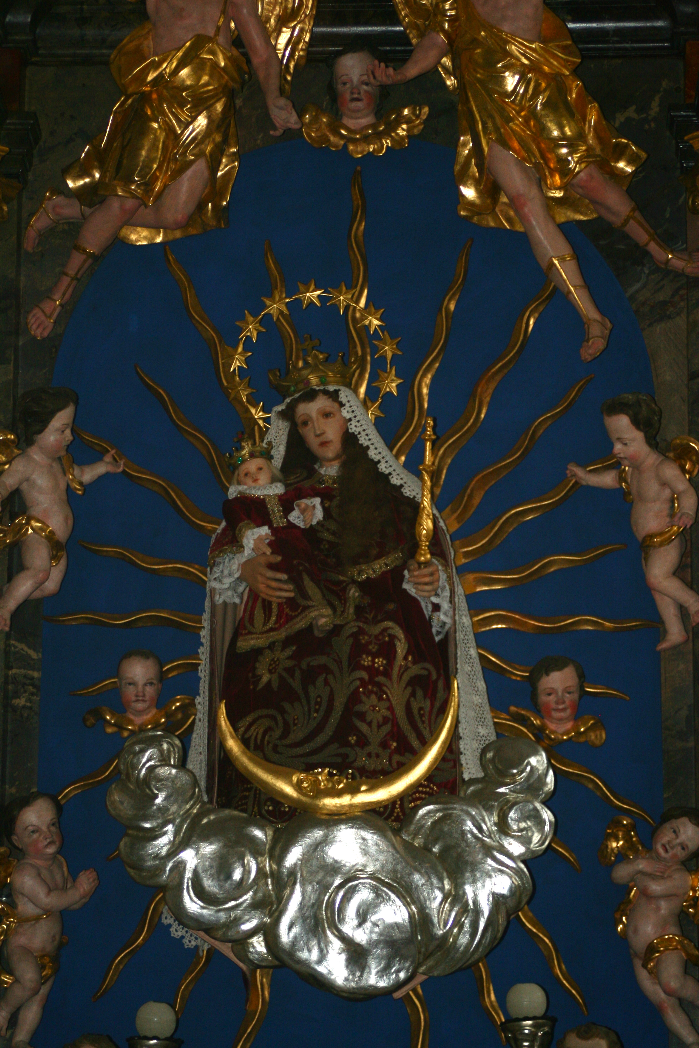 Die Madonna in der Kirche von Maria Brettfall bei Strass im Zillertal, Tirol